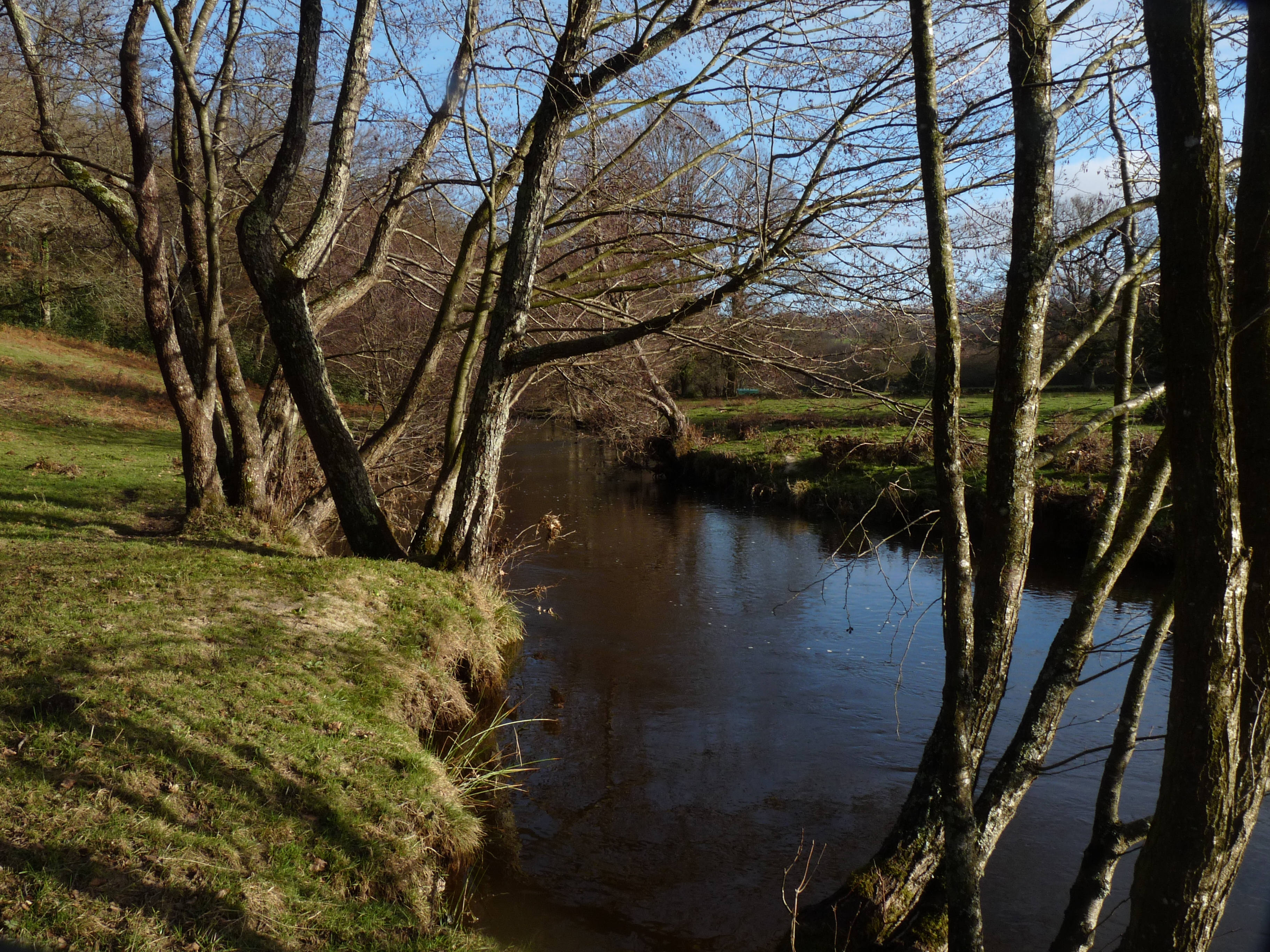 L'Ardour, près de La Prade, village de Saint-Étienne-de-Fursac, prise le 25 décembre 2011